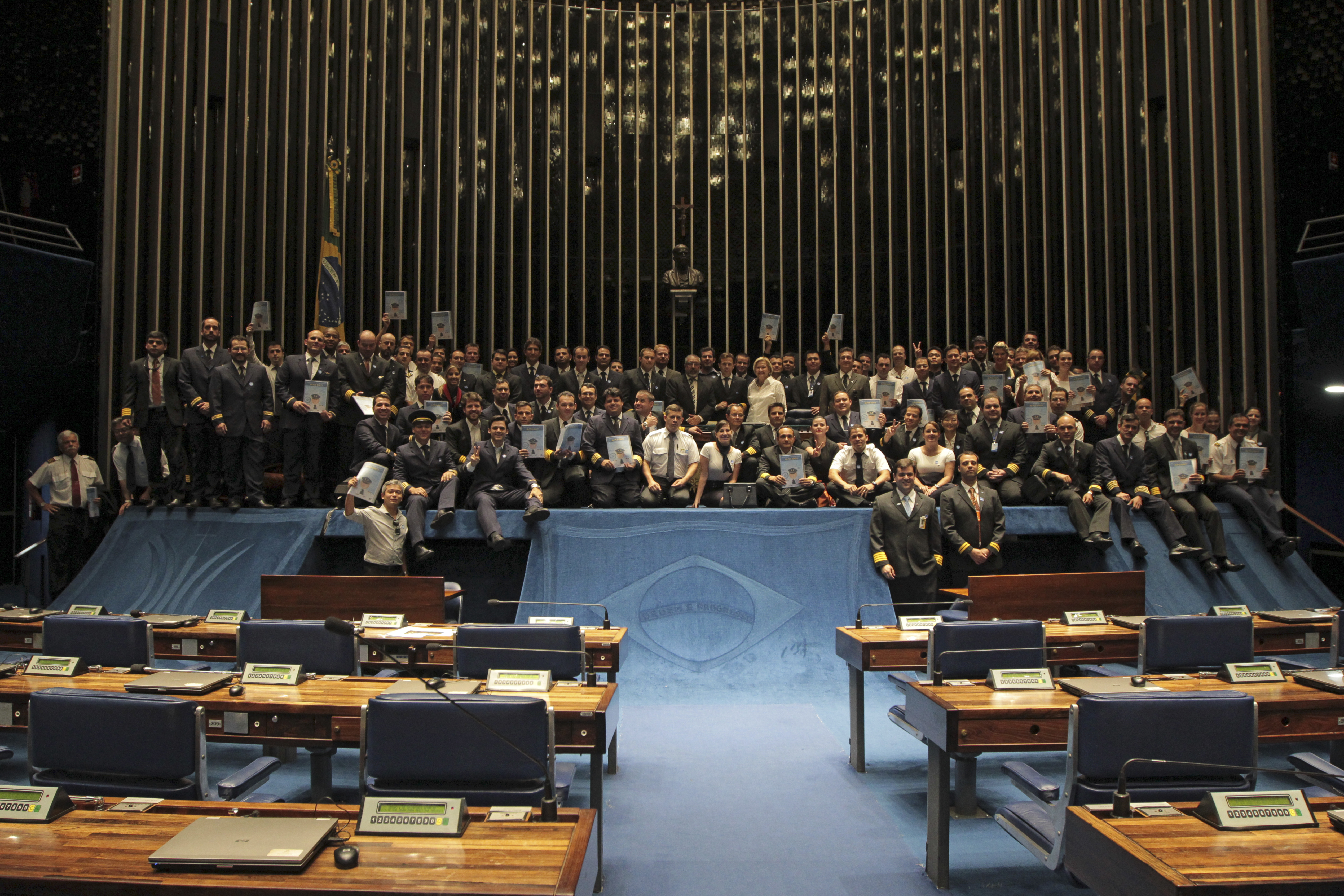 A fotografia datada do ano de 2014 é um registro de diversas idas dos aeronautas ao Congresso Nacional entre 2011 e 2017, para pleitear uma nova regulamentação para a profissão. É promulgada a lei nº 13.475, de 28 de agosto de 2017, a Nova Lei do Aeronauta.